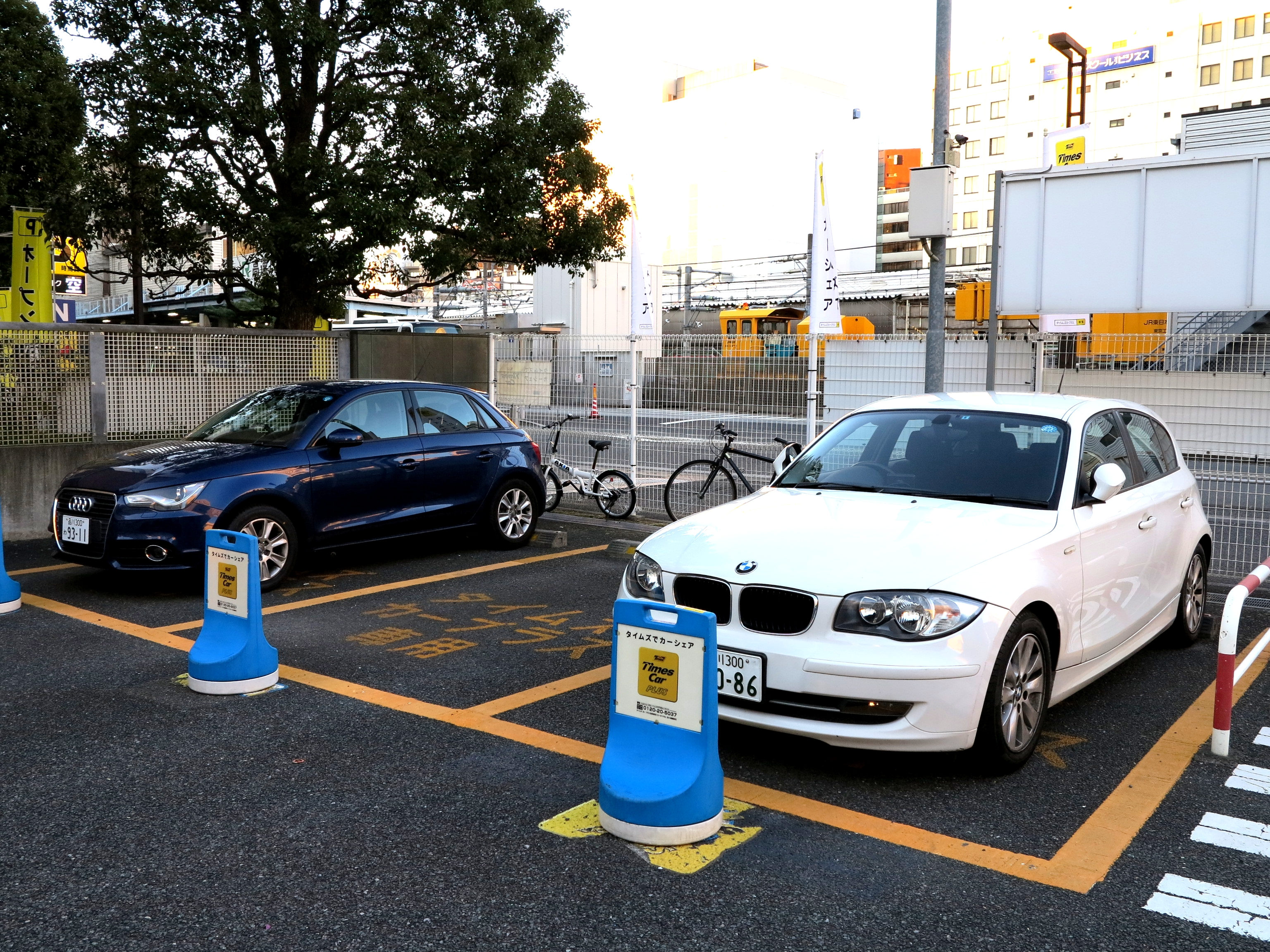 タイムズカープラスで貸し出されているアウディA1とBMW1シリーズ